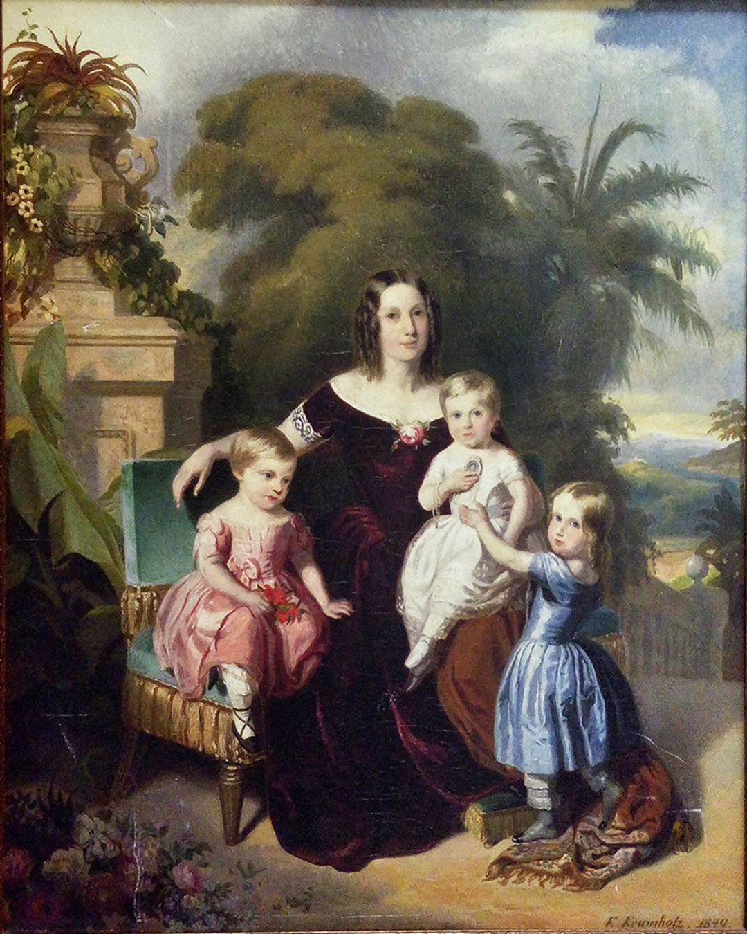 From left to right: Leopoldina, Teresa Cristina, Pedro Afonso and Isabel, Pedro II's familylabel QS:Len,"From left to right: Leopoldina, Teresa Cristina, Pedro Afonso and Isabel, Pedro II's family" label QS:Lpt,"A imperatriz do Brasil e seus três filhos pequenos (Isabel, Leopoldina e Pedro) em passeio ao parque de São Cristo, no Rio de Janeiro."